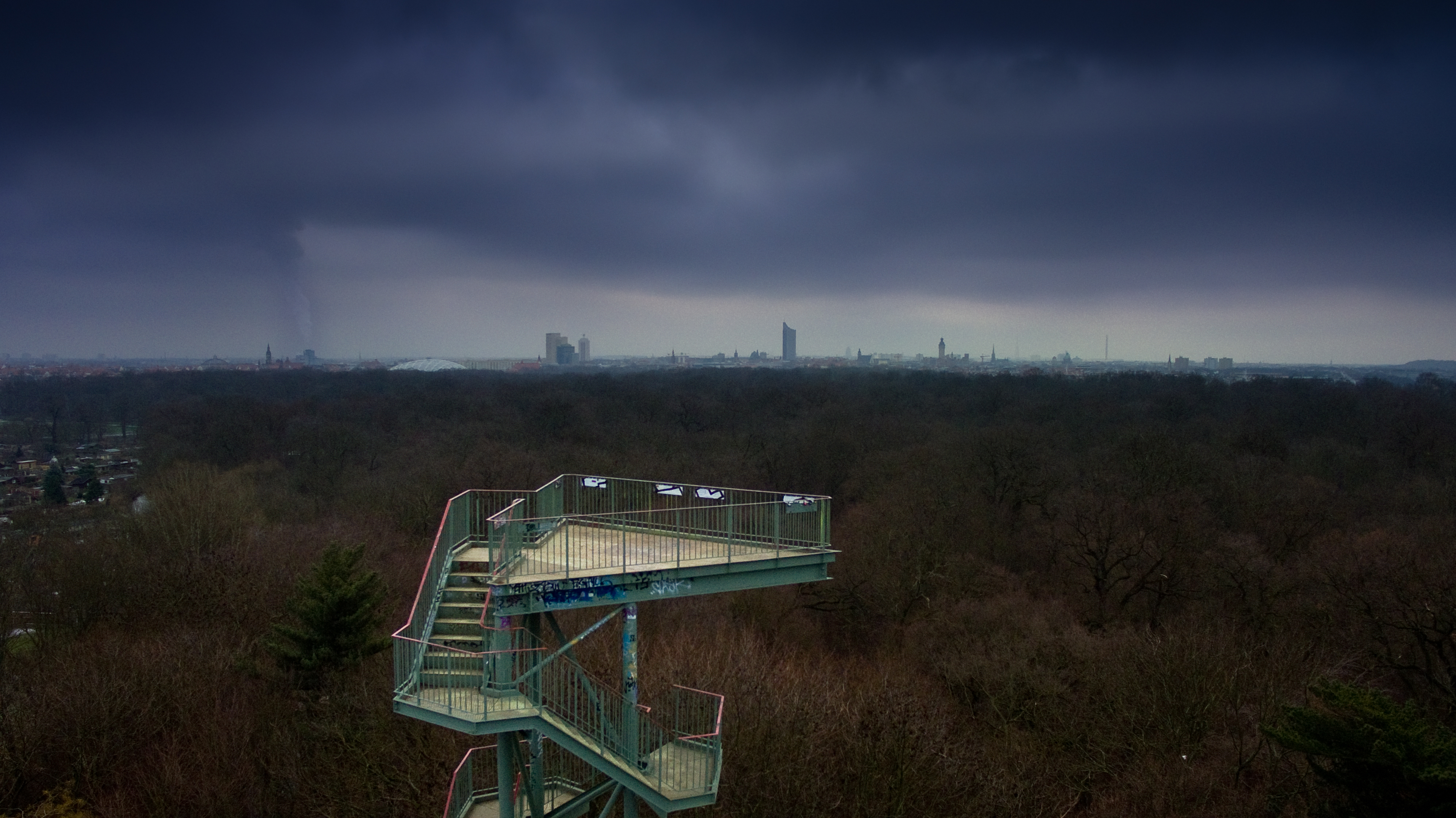 Leipzig, Rosental, Aussichtsturm. Luftbildaufnahme des Aussichtsturm im Rosental Leipzig mir Panoramablick auf die Innenstadt Leipzig mit Wahrzeichen.